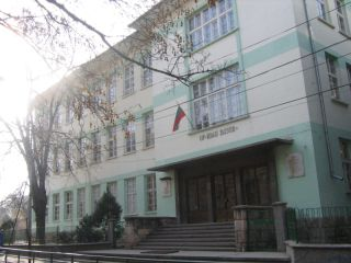 Снимка на ОУ "Иван Вазов", Русе